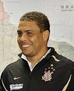 Copyred to File:LulaeRonaldo (2009).jpg